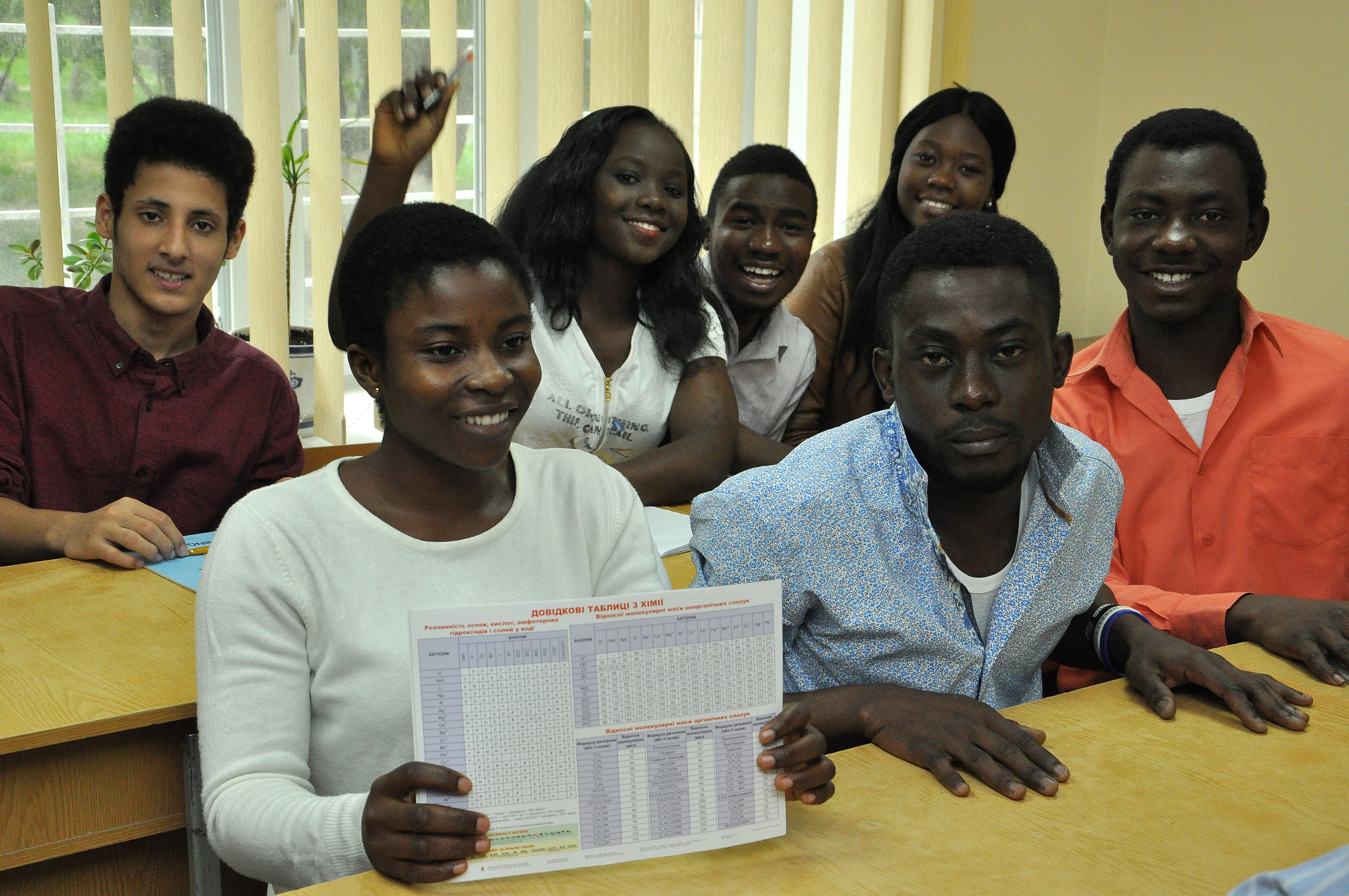 Підготовче відділення для іноземців та осіб без громадянства Тернопільського державного медичного університету імені І. Я. Горбачевського. Слухачі підготовчого відділення.